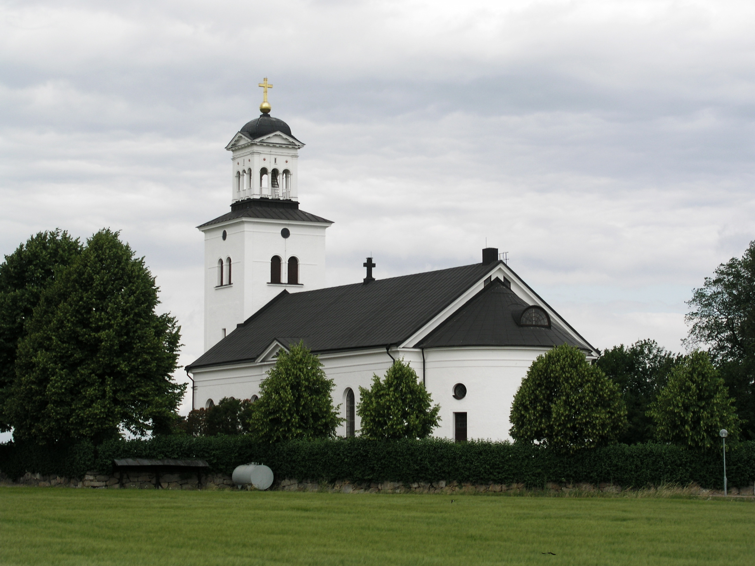 Röks kyrka, distant view